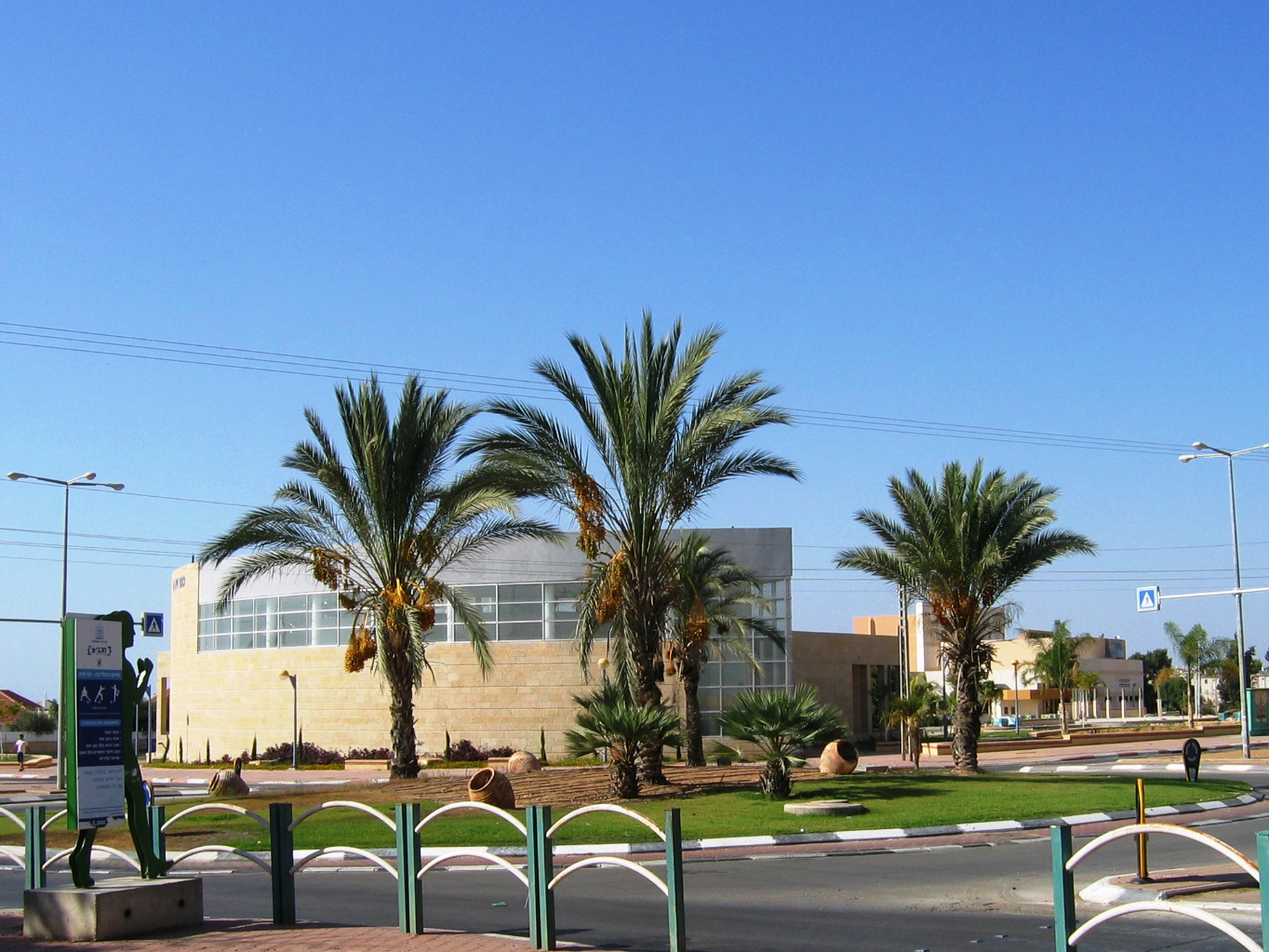 הספרייה העירונית